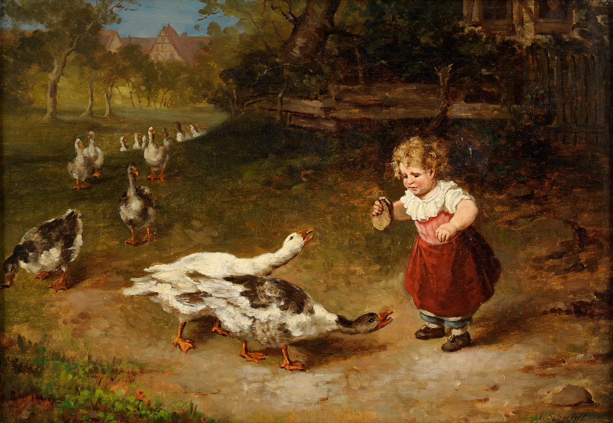 Eine gefiederte Bande. Signiert. Öl auf Leinwand, 32,5 x 47 cm